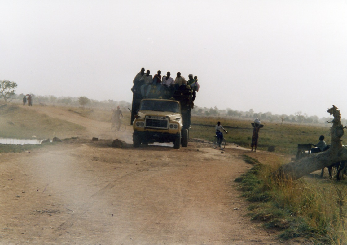 Foto personale su di una pista in sud Ciad nell'Aprile 2004